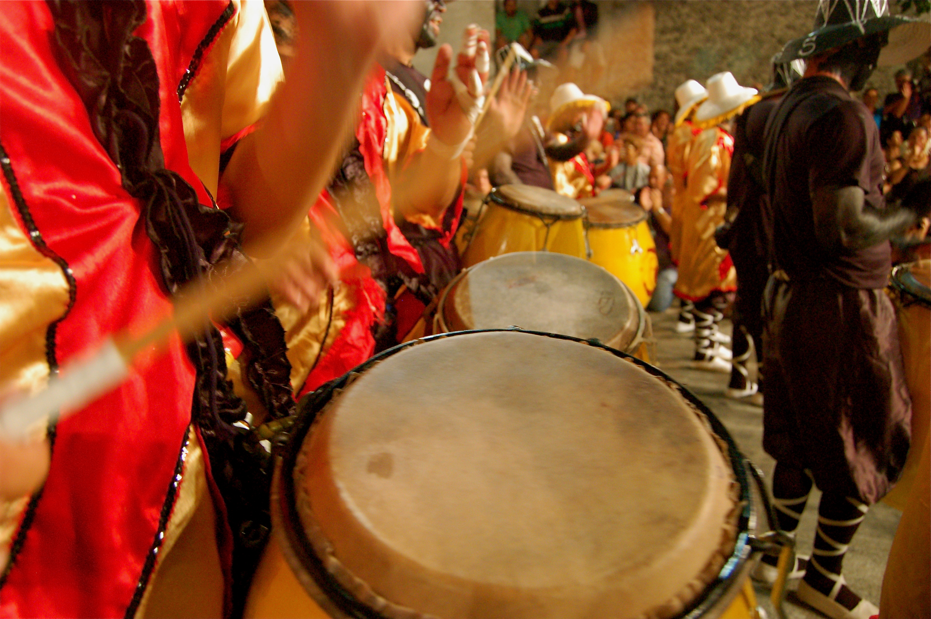 Foto tomada durante el Desfile de Llamadas 2010. Comparsa: La Tangó Candombe